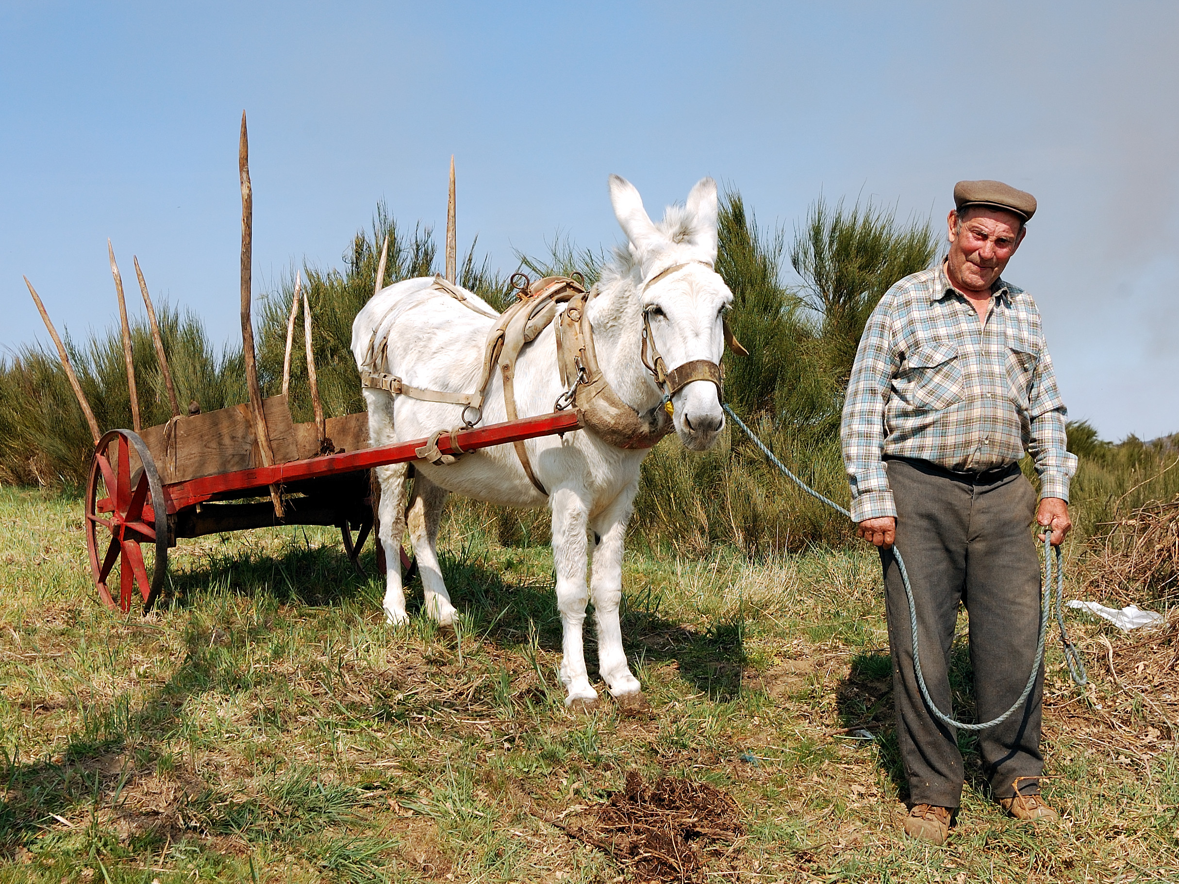 Montalegre, Portugal [2009]